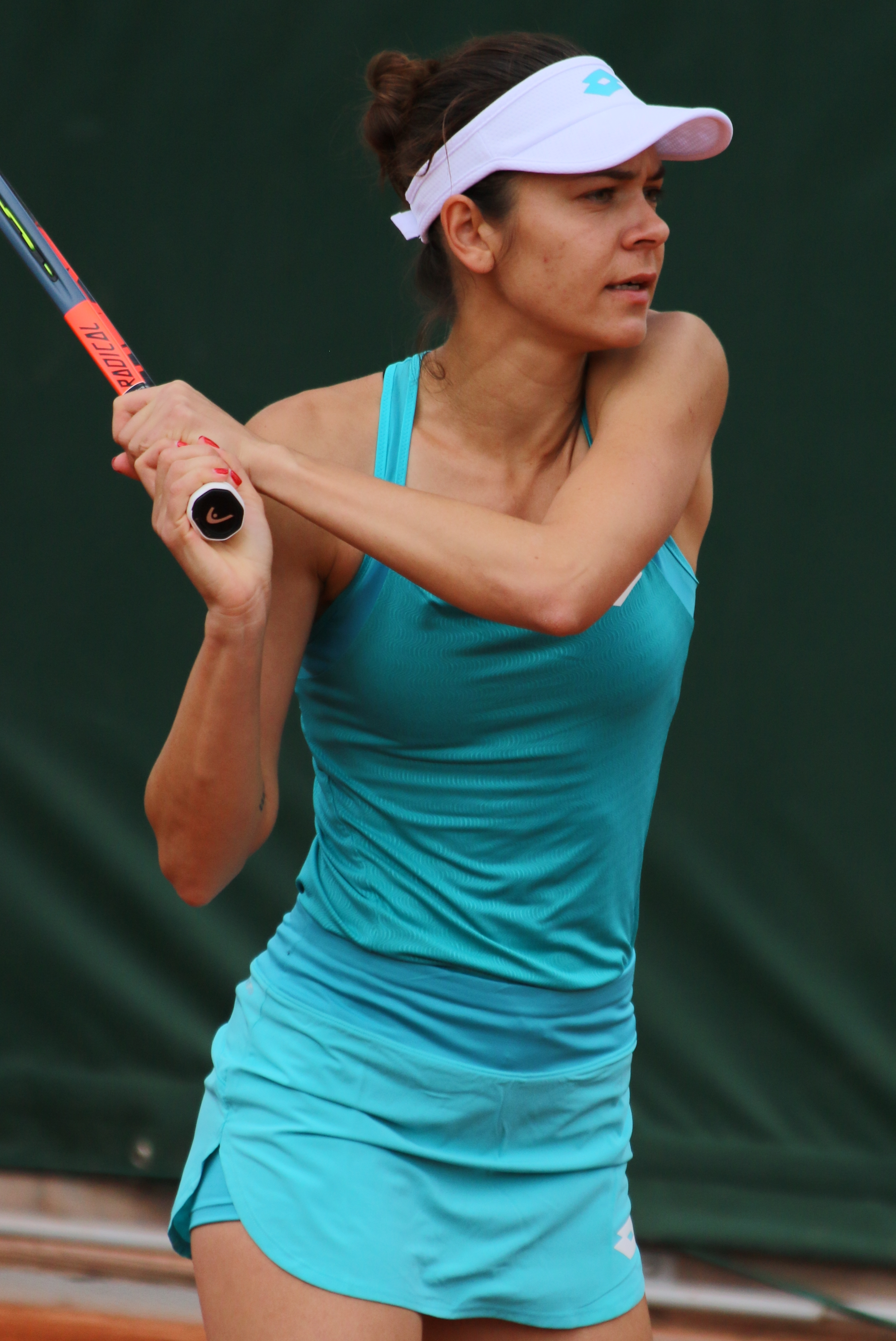 Mitu RG19 (7)